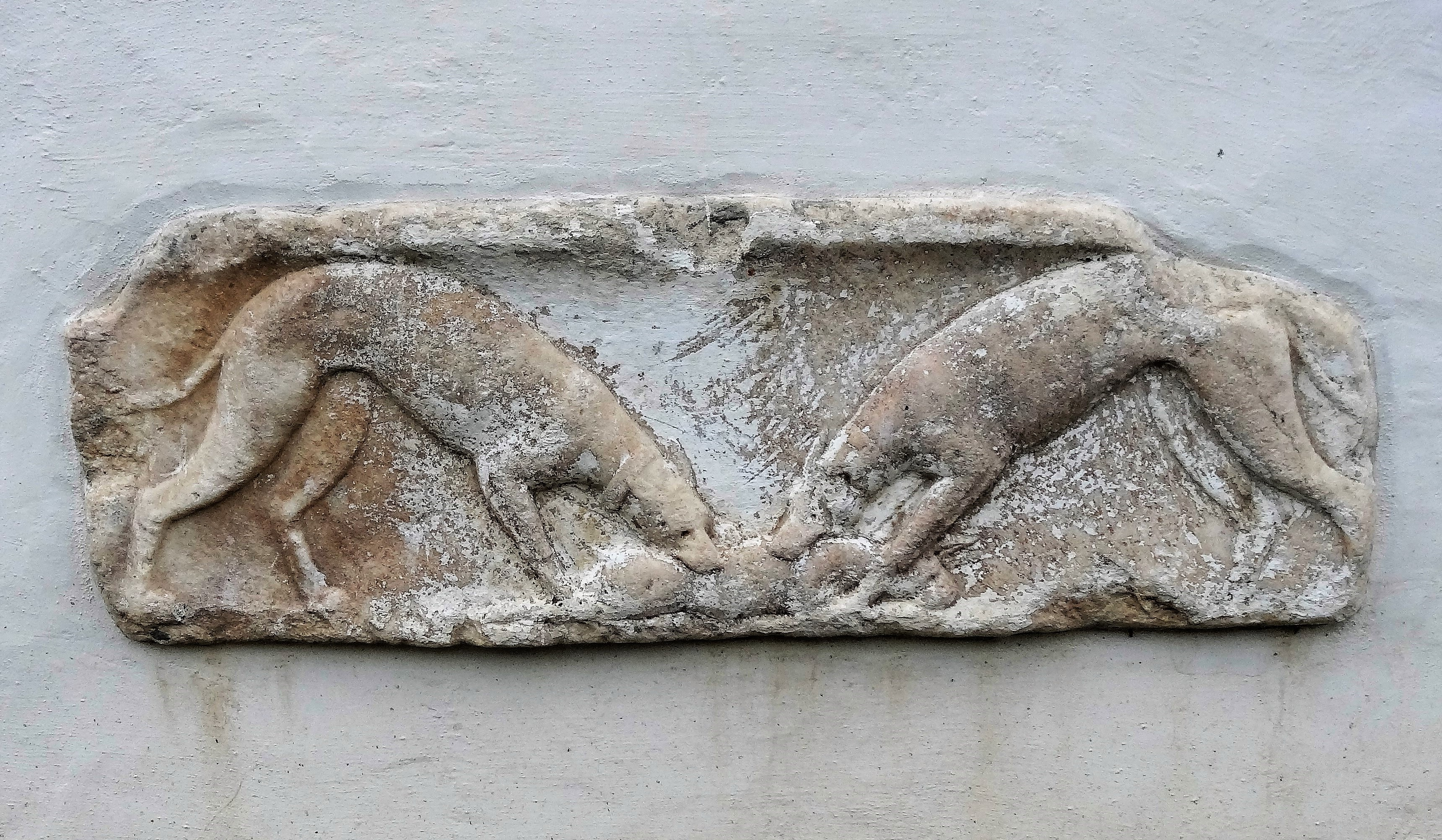 Kath. Pfarrkirche Hl. Jakobus d. Ä. (Tiffen), Römerstein an der südlichen Außenwand mit der Darstellung zweier einen Hasen reißenden Hunde